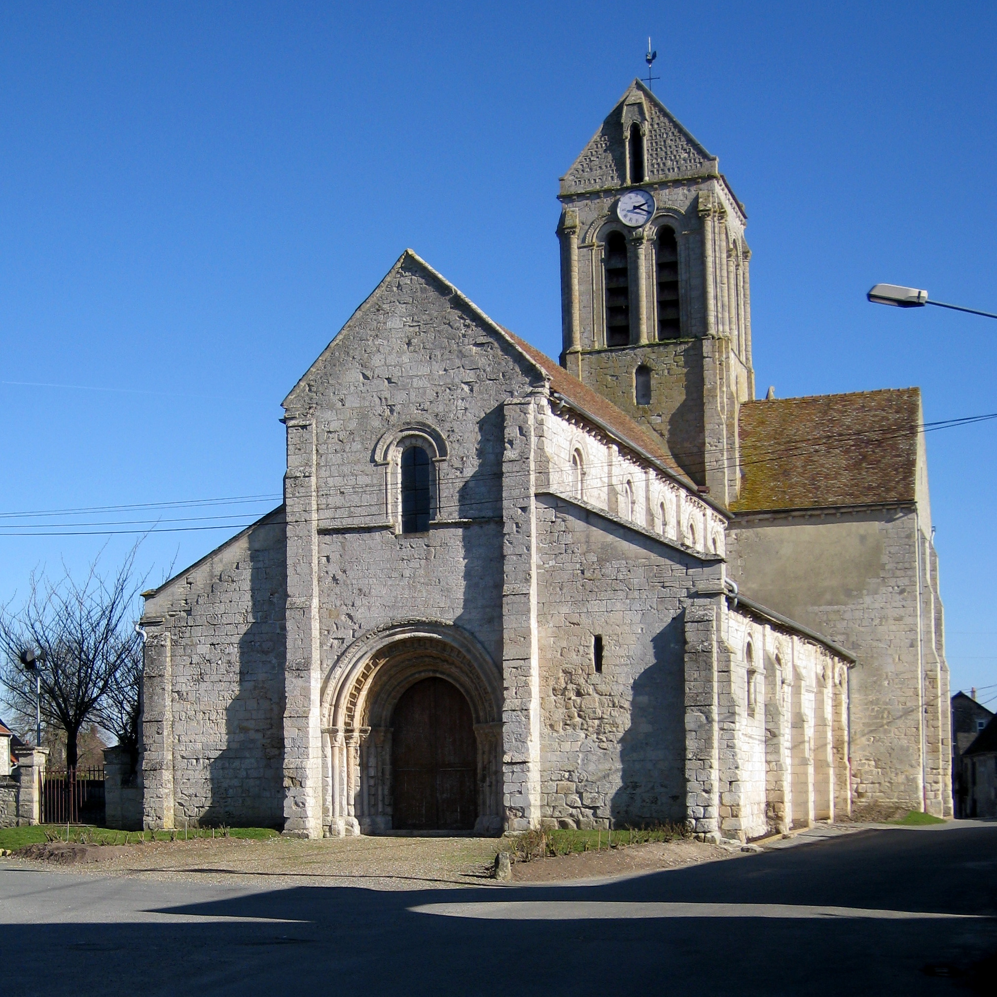 L'église de Lavilletertre, Oise, France